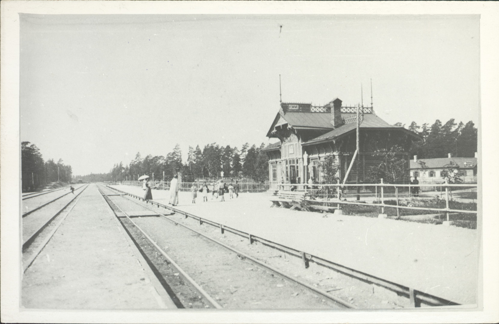 Nõmme raudteejaam